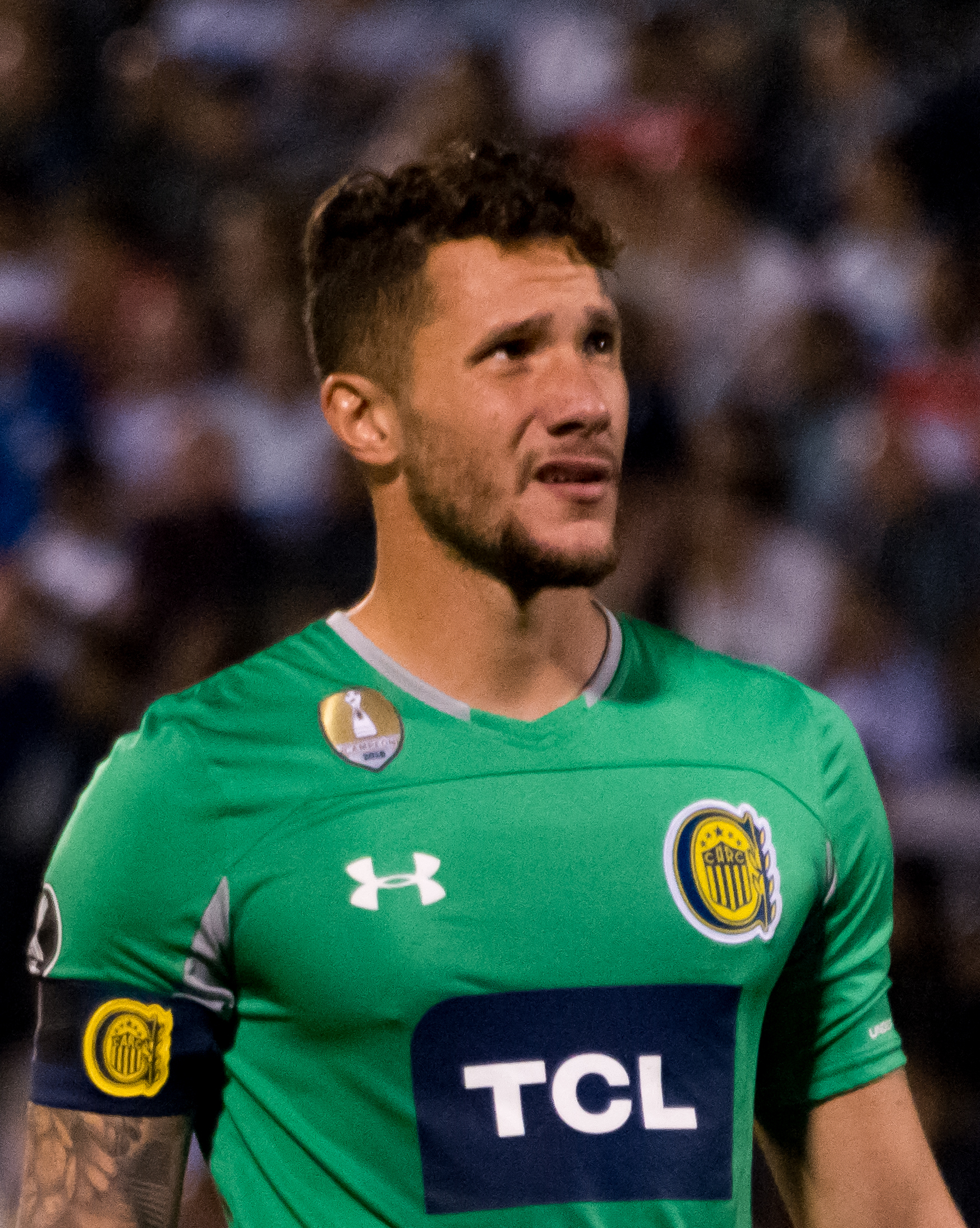 Jeremías Ledesma, Universidad Católica v Rosario Central, Estadio San Carlos de Apoquindo, Las Condes, Santiago, Chile.